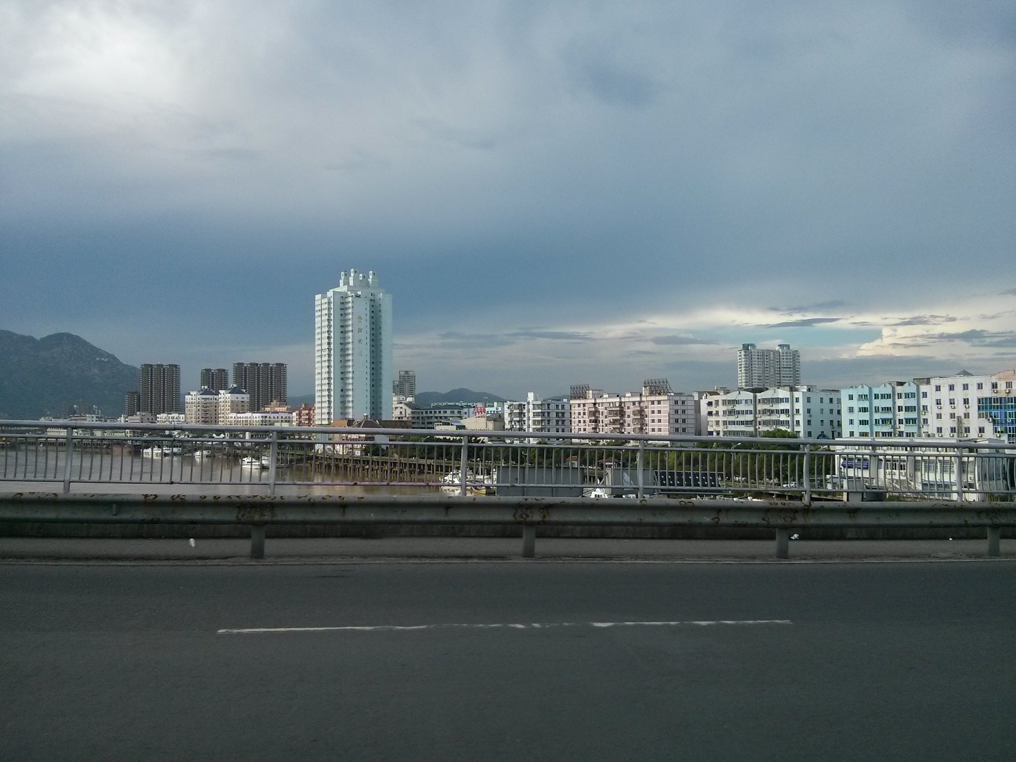 浙江省温州市苍南县